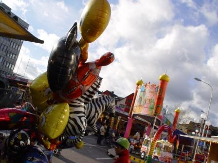 Chläusler in Gossau im November